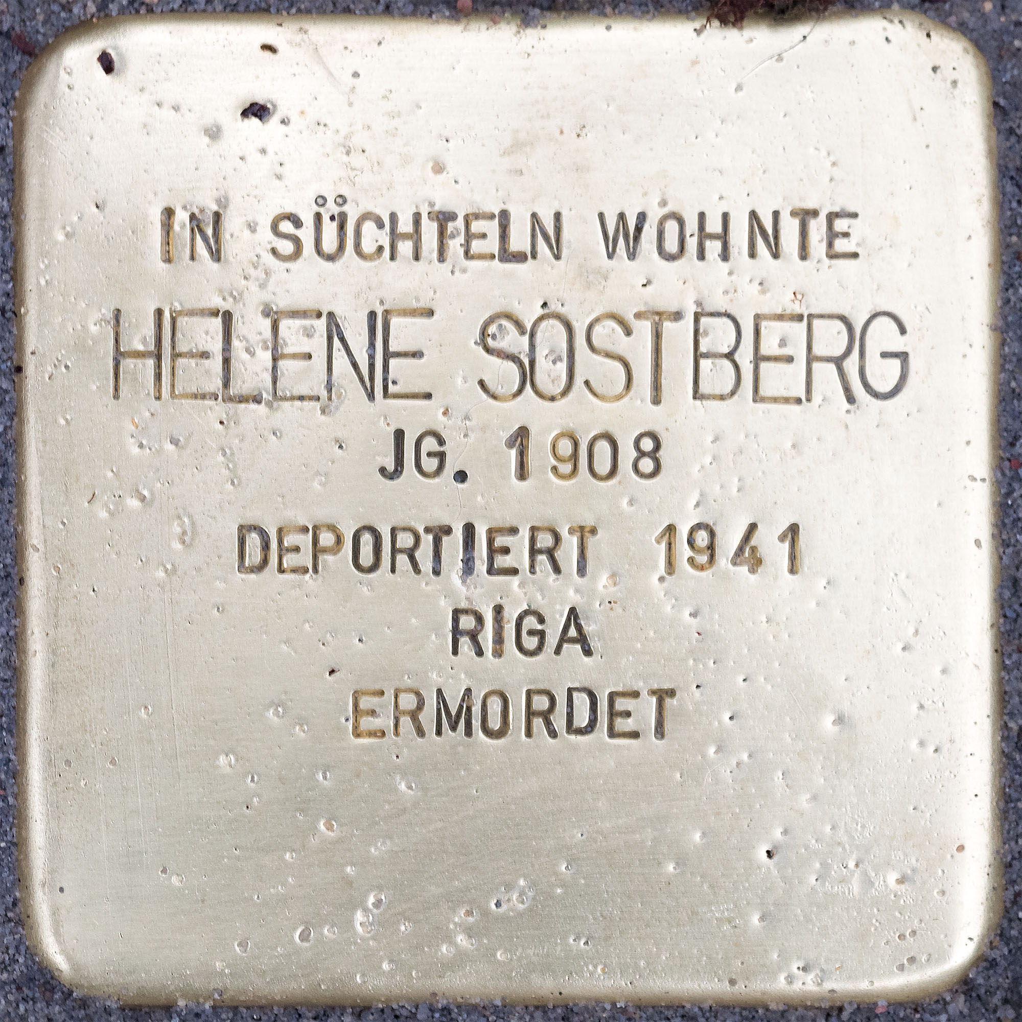 Stolpersteine Suechteln: Sostberg, Helene